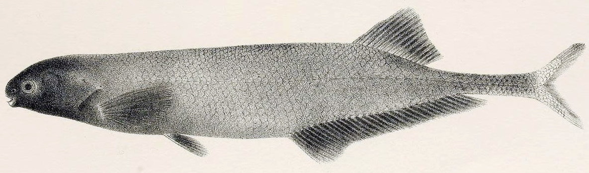 Schmaler Nilhecht (Brienomyrus longianalis) (Boulenger, 1901)